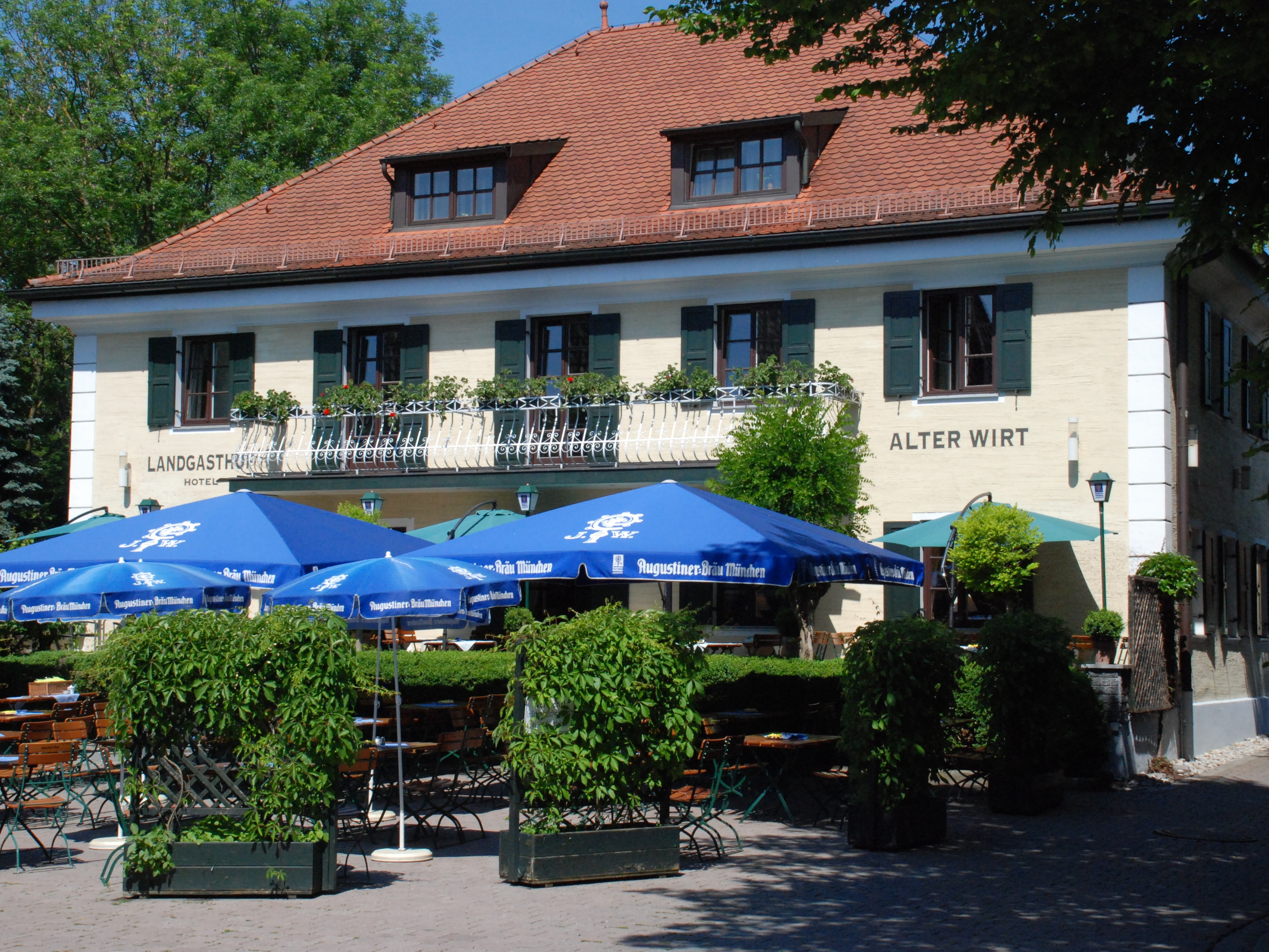 Denkmalgeschützter Gasthof Alter Wirt in Unterschleißheim, Landkreis München (Bayerische Denkmalliste D-1-84-149-2)